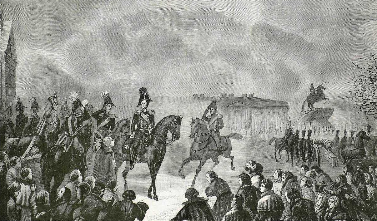 Император Николай I на Сенатской площади 14 декабря 1825 года